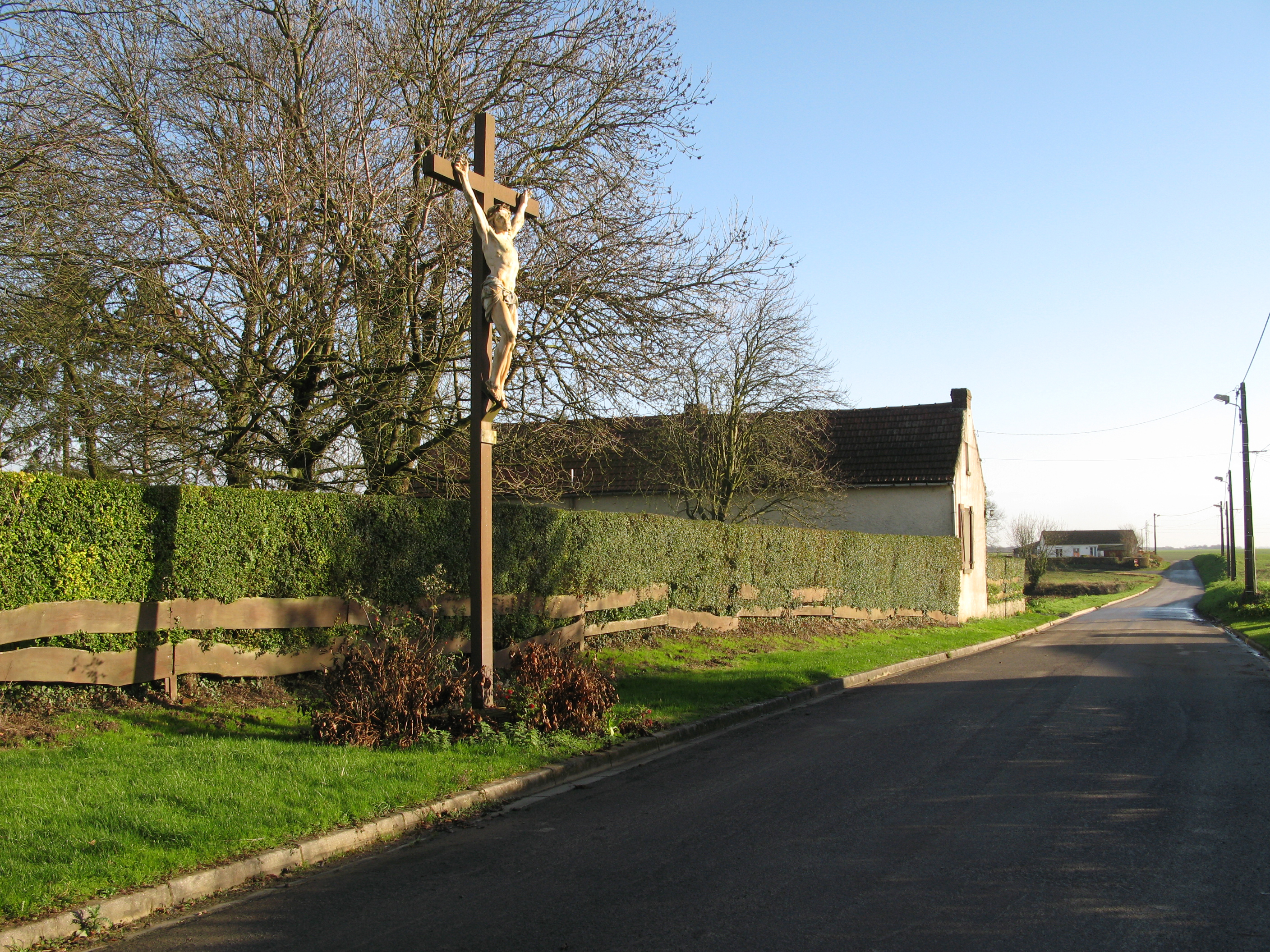 Vraignes-en-Vermandois (Somme, France) - Le calvaire, dressé à la sortie Sud du village. .